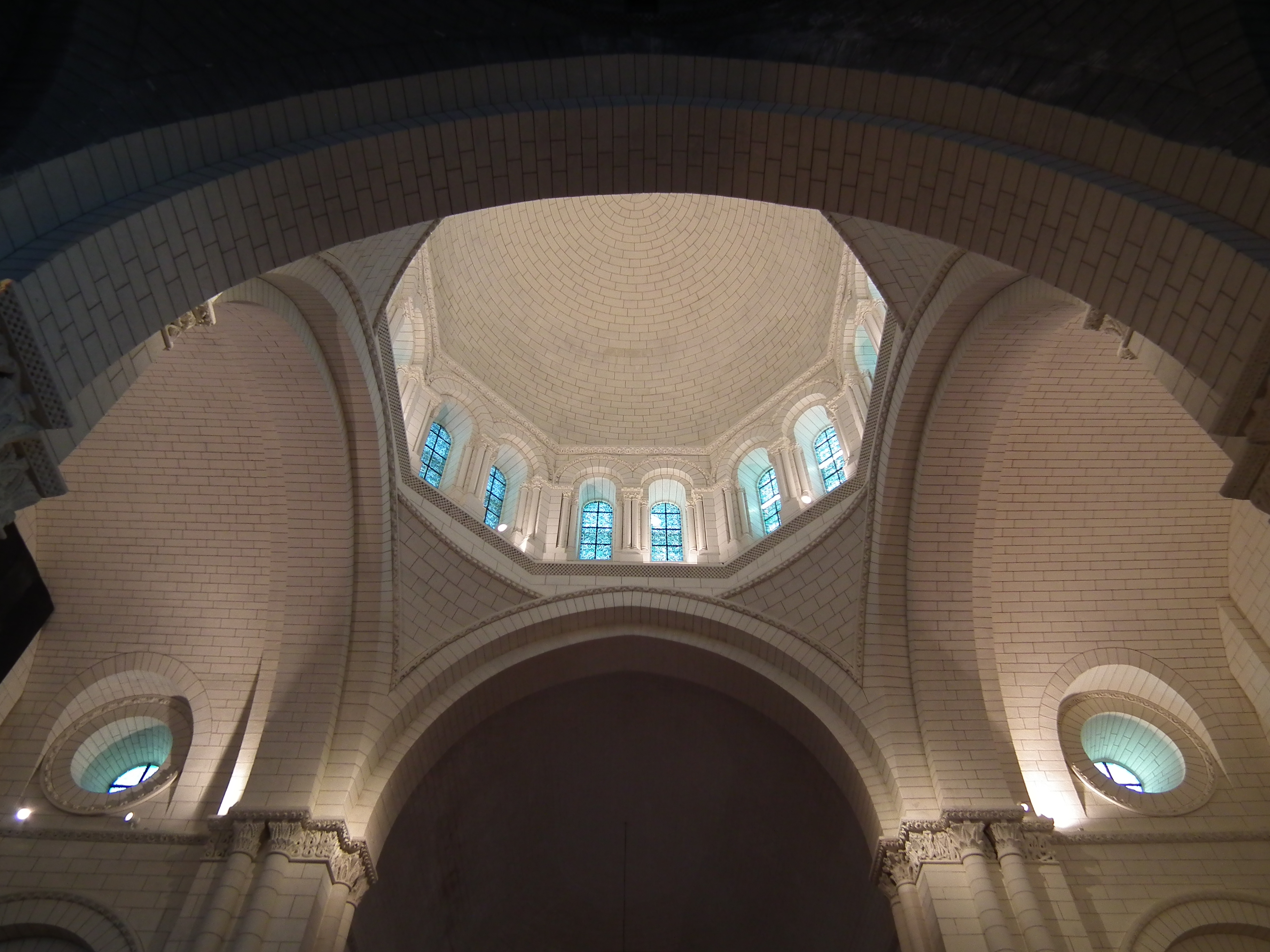 Le dôme de la cathédrale d'Angoulême